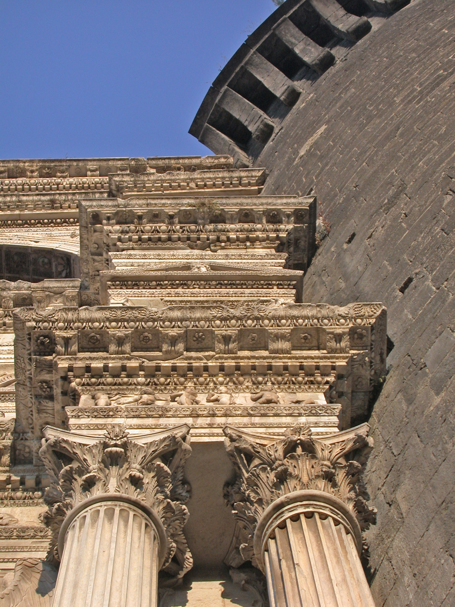 Italia, Campania, Napoli, Castel Nuovo (Maschio Angioino), arco trionfale di ingresso, gli ordini sovrapposti